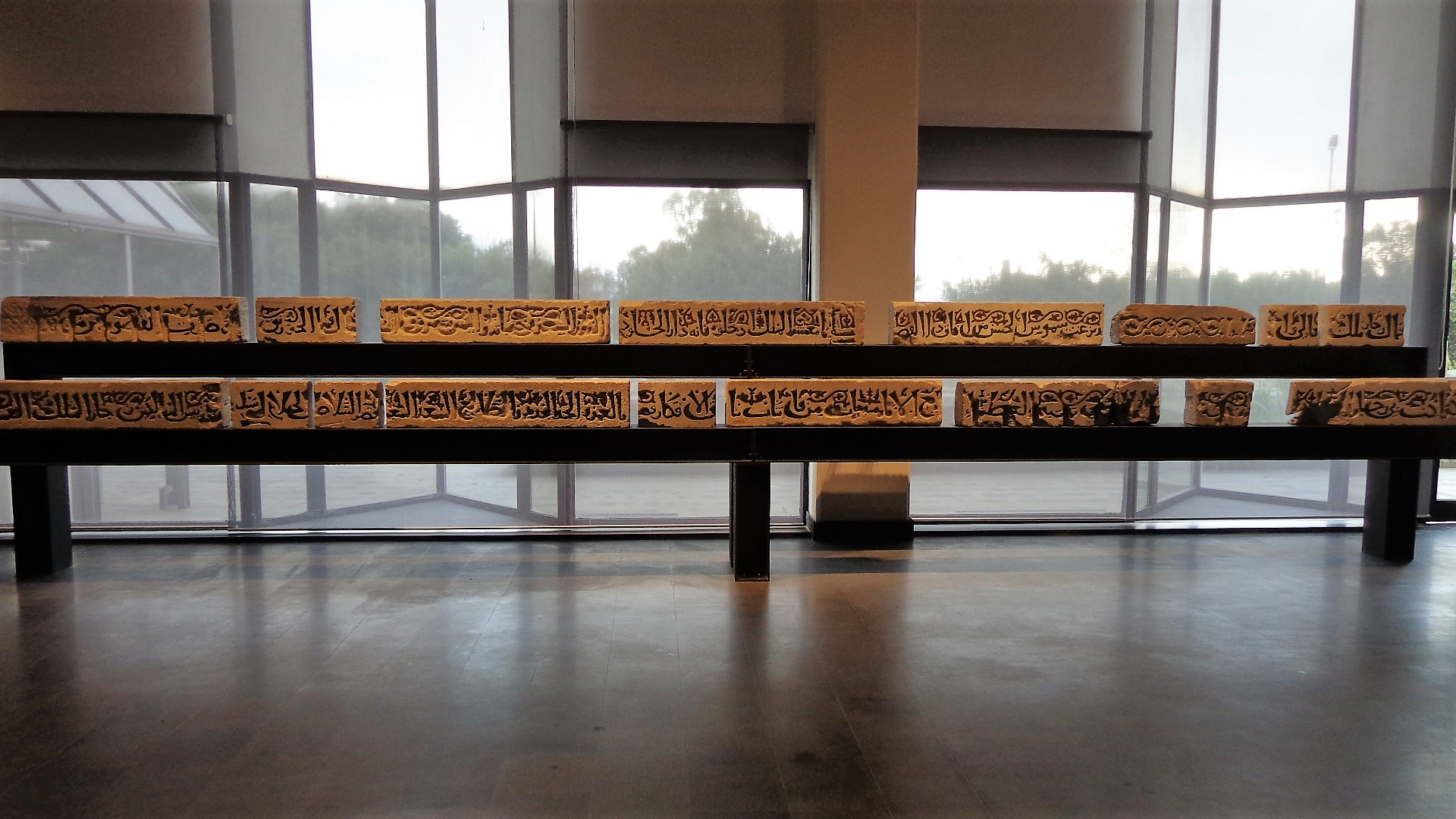 Iscrizioni provenienti dal duomo e dalla cappella di Castellammare